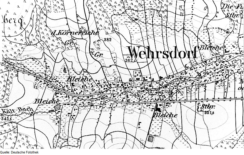 Original image description from the Deutsche Fotothek Sohland a. d. Spree-Wehrsdorf. Meßtischblatt, Sekt. Schirgiswalde, 1882